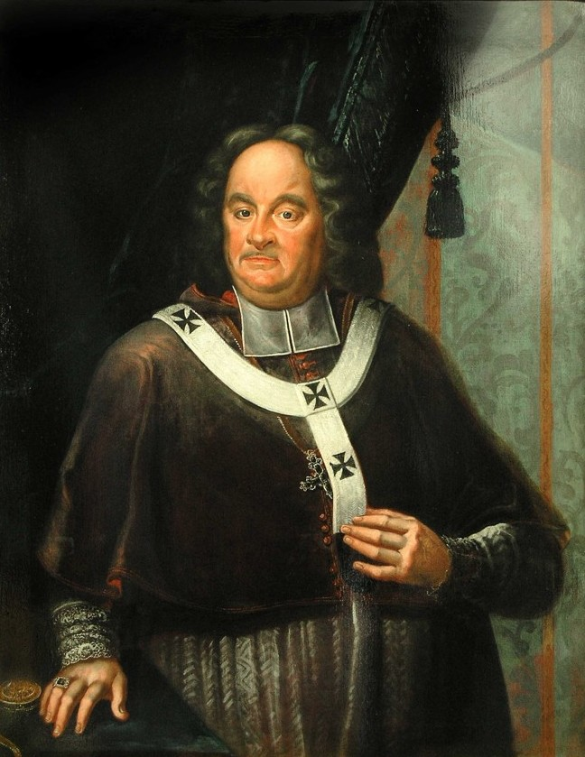 Daniel Josef Mayer z Mayernu, kanovník u sv. Víta v Praze, probošt tamní kapituly, titulární biskup tiberiadský a pomocný biskup pražský